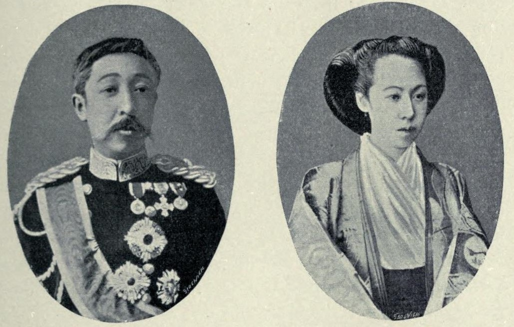 伏見宮貞愛夫妻